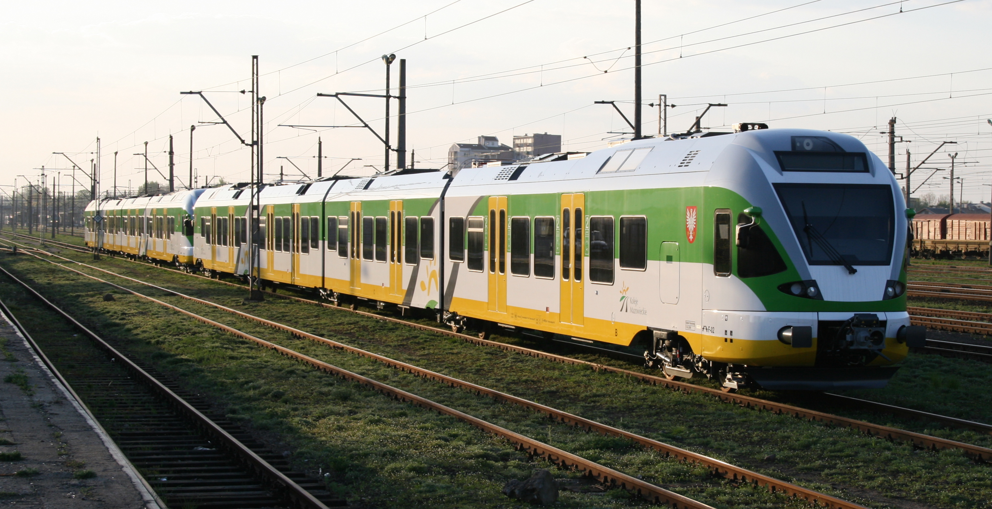 Pociąg ER75 w barwach Kolei Mazowieckich